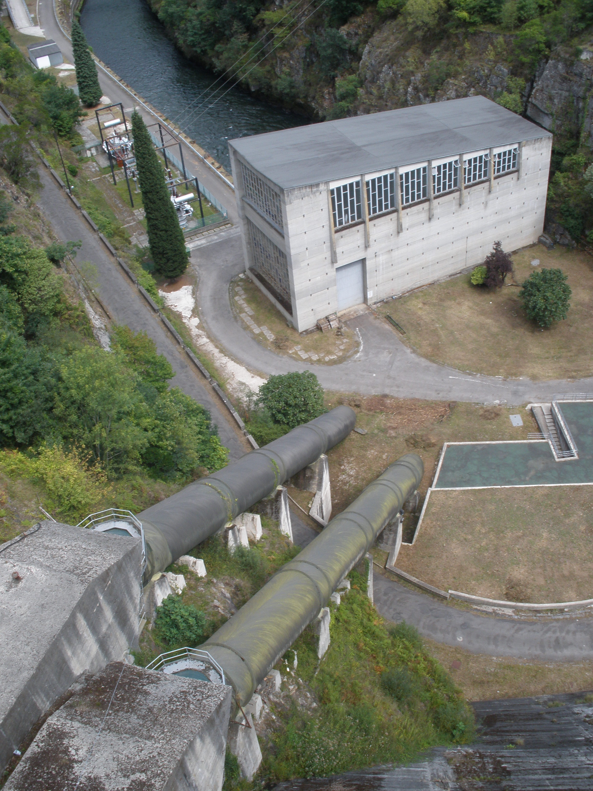 Vista general de la central hidroeléctrica de Doiras, en Boal (Asturias)